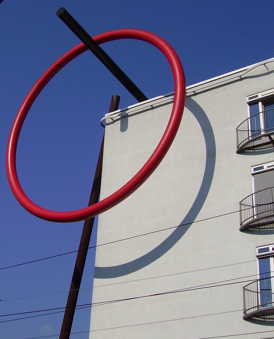 "Ring des Seyns" by Kazuo Katase, Ludwigshafen in Rheinland-Pfalz (Germany)